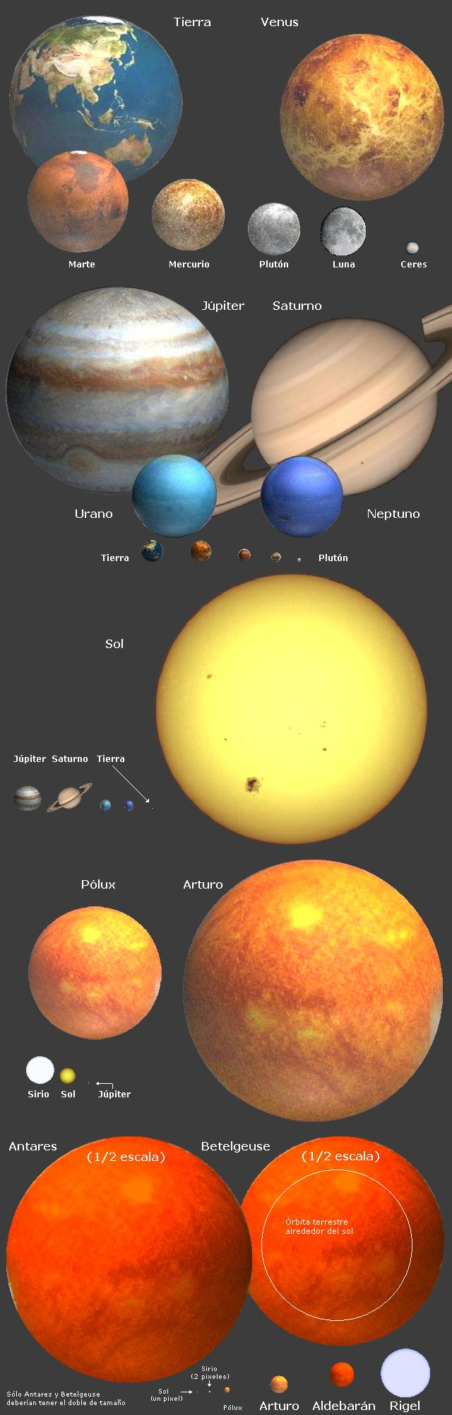 Tamaños a escala de diversos cuerpos celestes, desde el asteroide o planeta enano Ceres, de 975 Km, la Tierra, de 12.756 Km, hasta Antares, 700 veces mayor que nuestro Sol (aprox. 975 millones de Km), unas 3 veces y cuarto mayor que nuestra órbita.